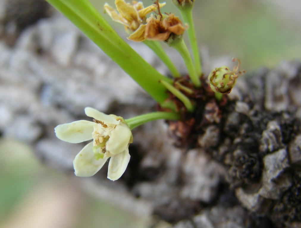 Erythroxylum tortuosum - ERYTHROXYLACEAE Parque Olhos d' água - Brasília - Distrito Federal - Brasil.